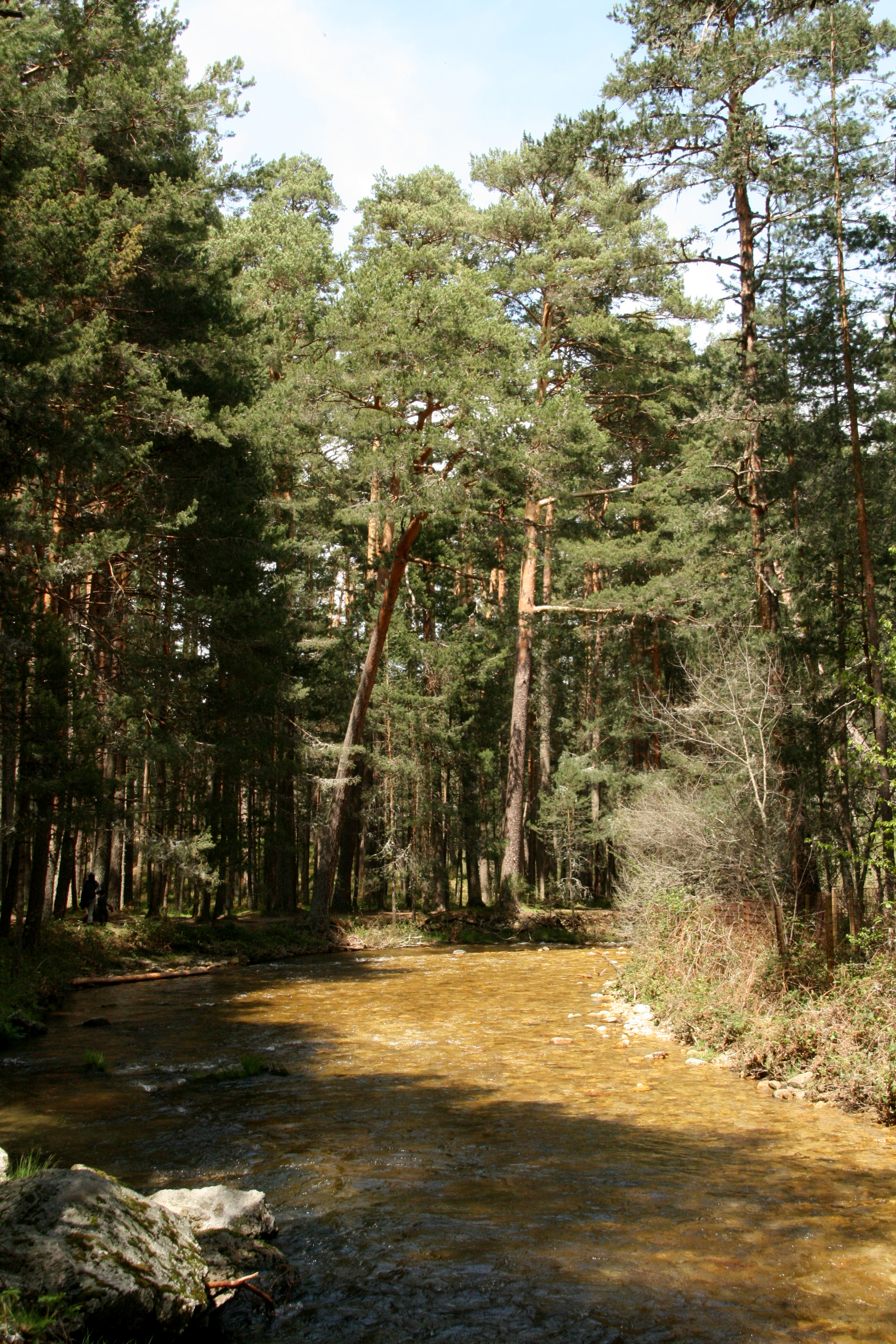 Pinares en el valle del río Eresma, entre las zonas recreativas de Boca del Asno y Los Asientos. Forma parte del lugar de interés comunitario de la Sierra de Guadarrama y del parque natural Sierra Norte de Guadarrama. This is a photography of a Special Area of Conservation in Spain with the ID: ES4160109. Natura2000 entry, EEA entry